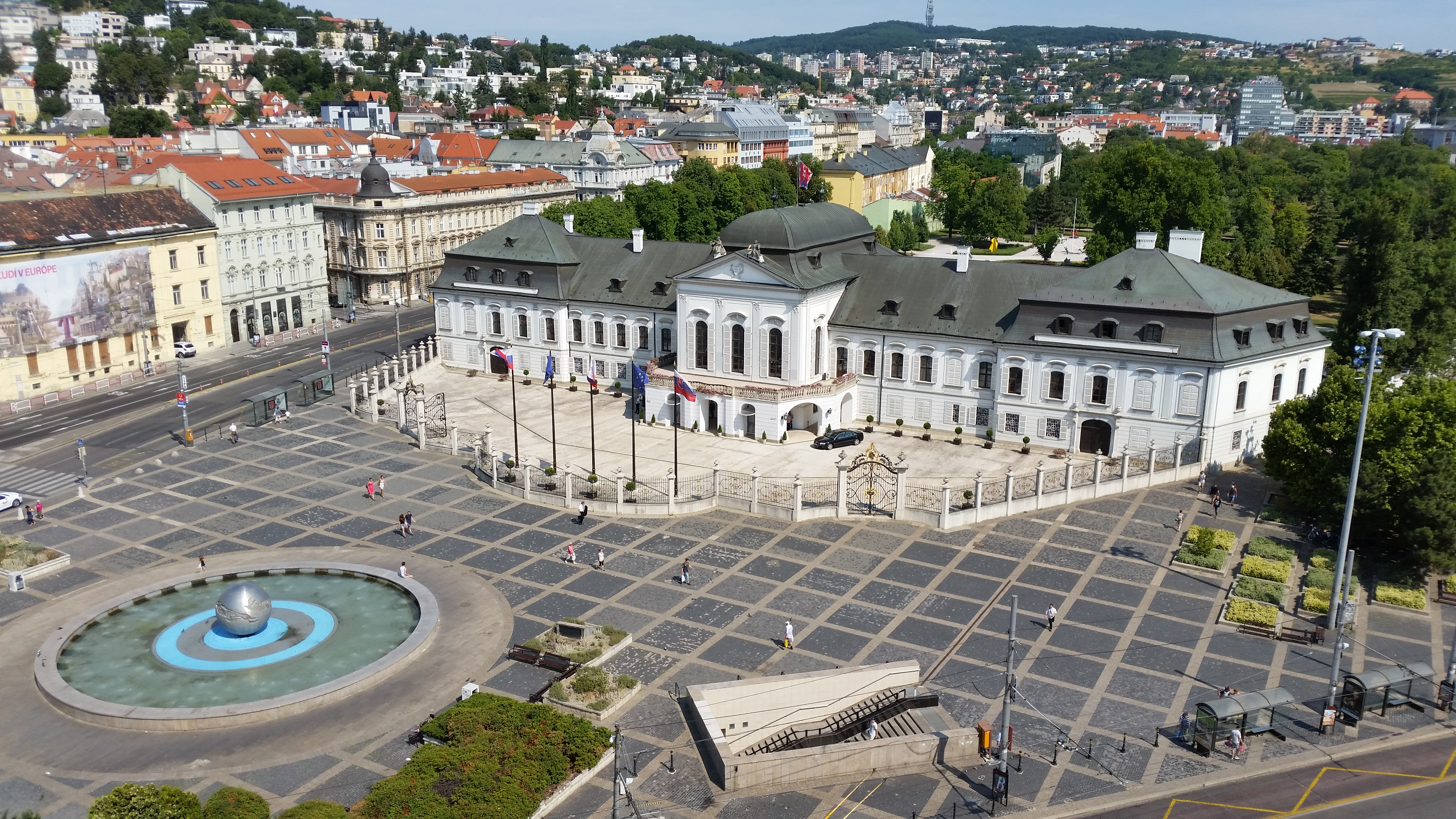 Grassalkovichov palác